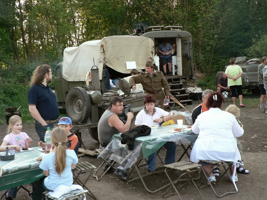 Oslavy osvobozeni v muzeu